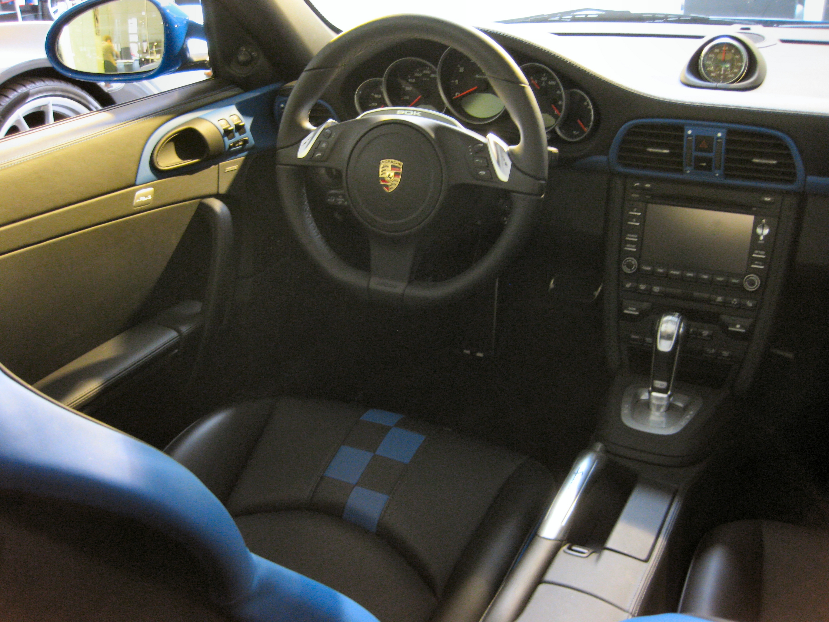 Porsche 997 Speedster Cockpit